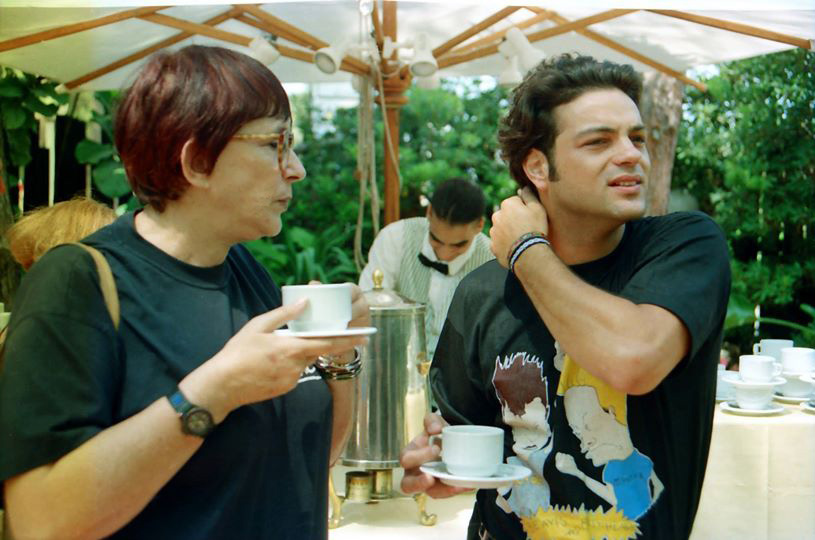 לביאה הון ואקי אבני